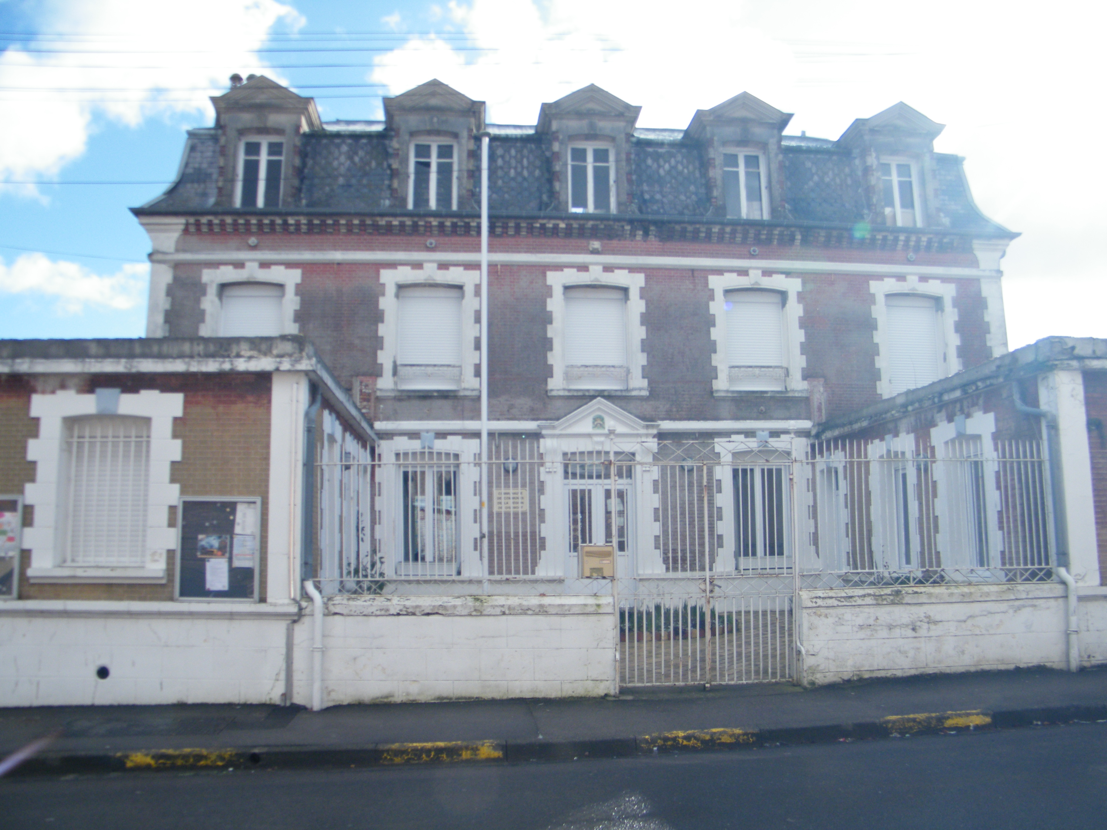 Oisemont, Somme, Fr, communauté de communes du canton d'Oisemont, ancien siège, devenu antenne de la CC2SO (communauté de Communes Somme-Sud-Ouest).